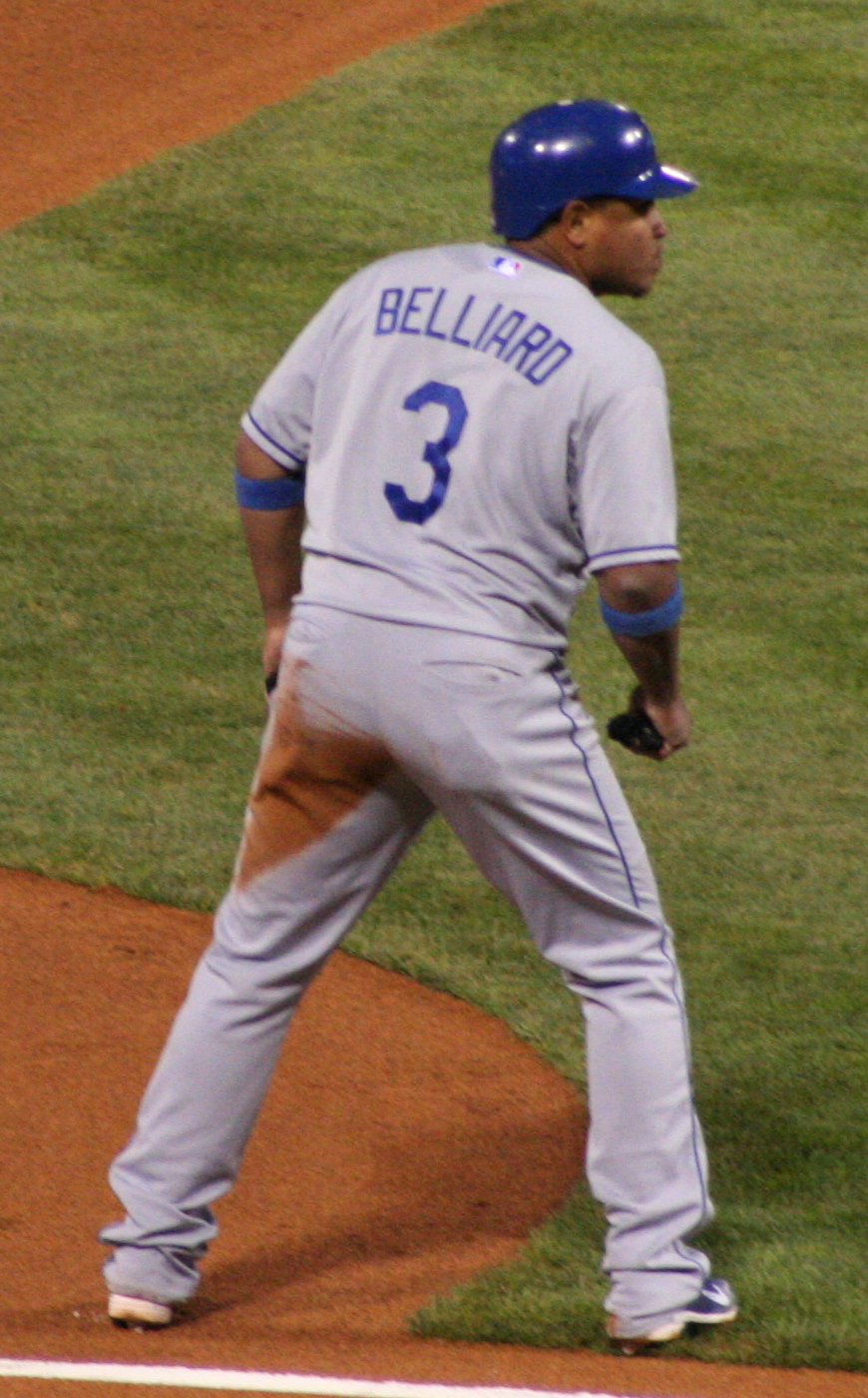 Ronnie Belliard